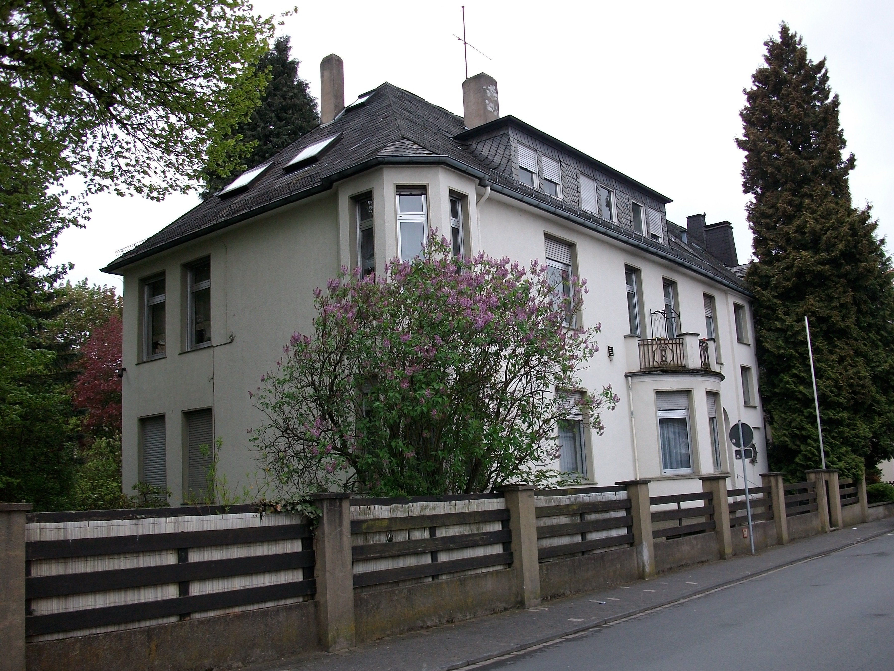 Geburtshaus von August Macke, Meschede, Schützenstraße (Germany)